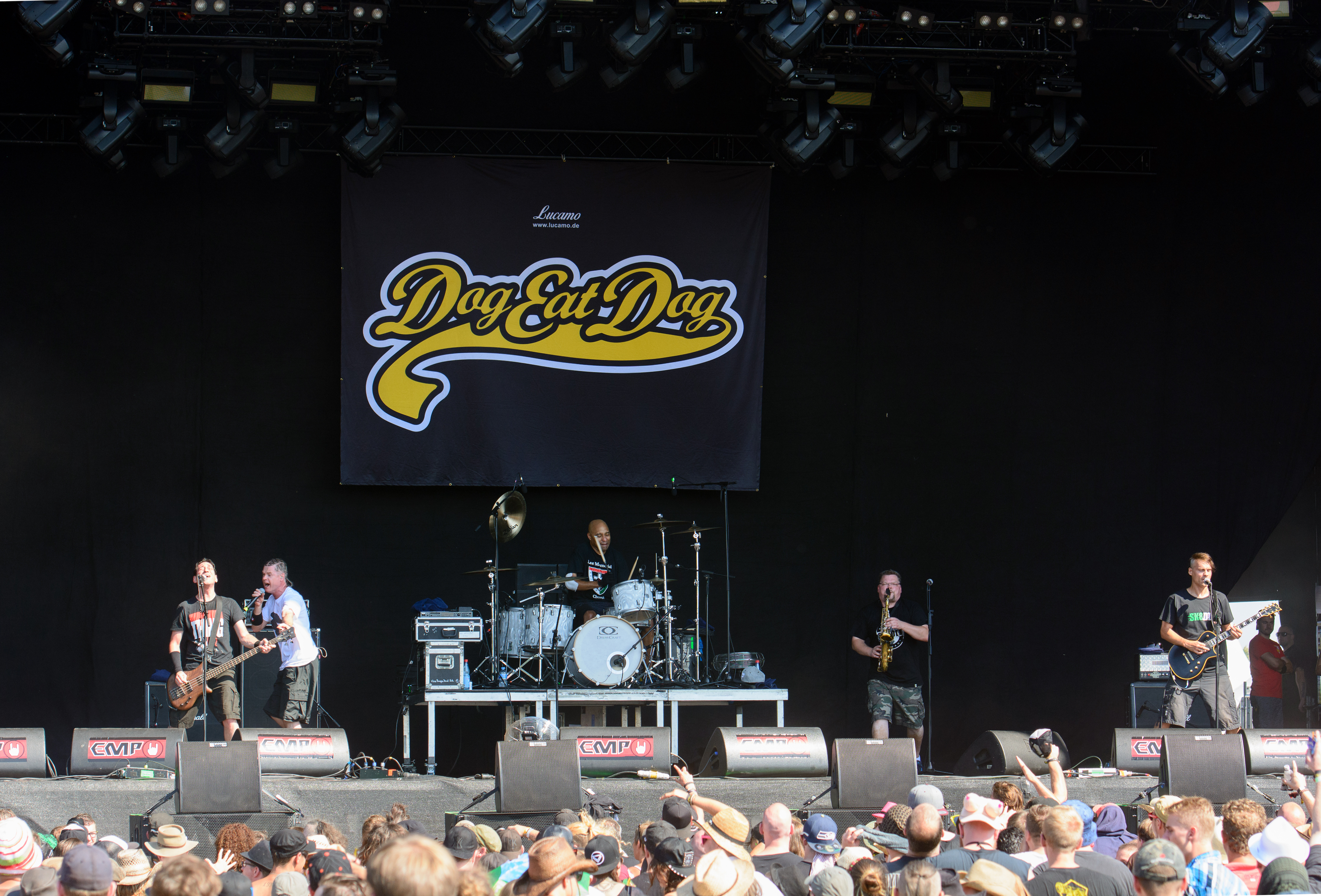 Dog eat Dog beim Reload Festival 2016 in Sulingen